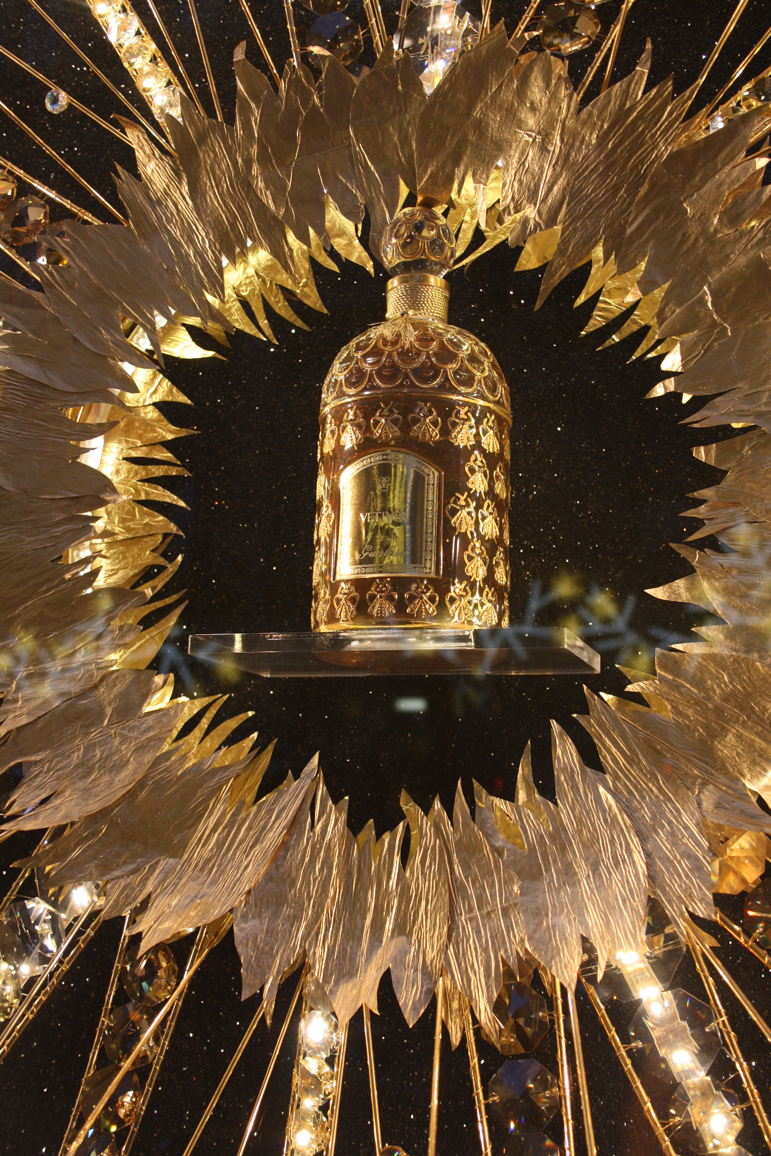 Guerlain Golden Bee Bottle